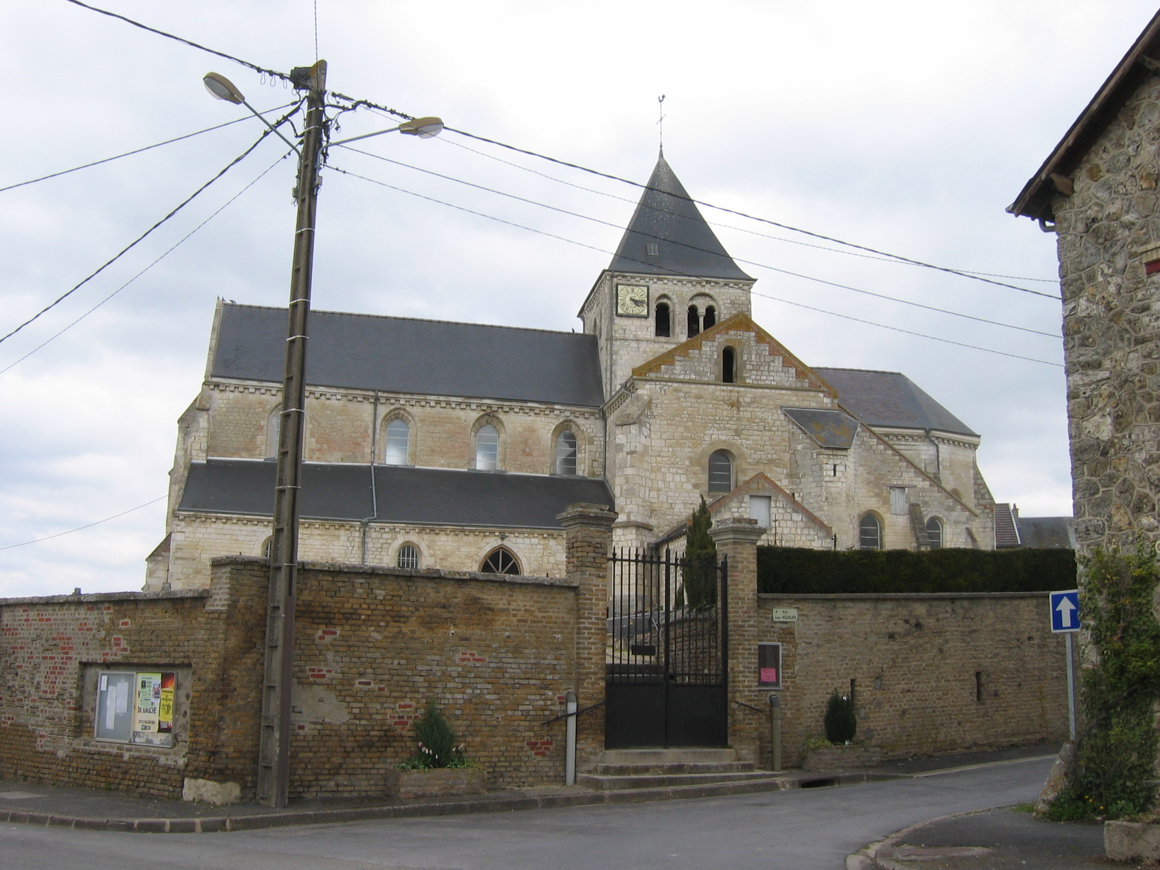 Eglise de St-Germainmont Ardennes France